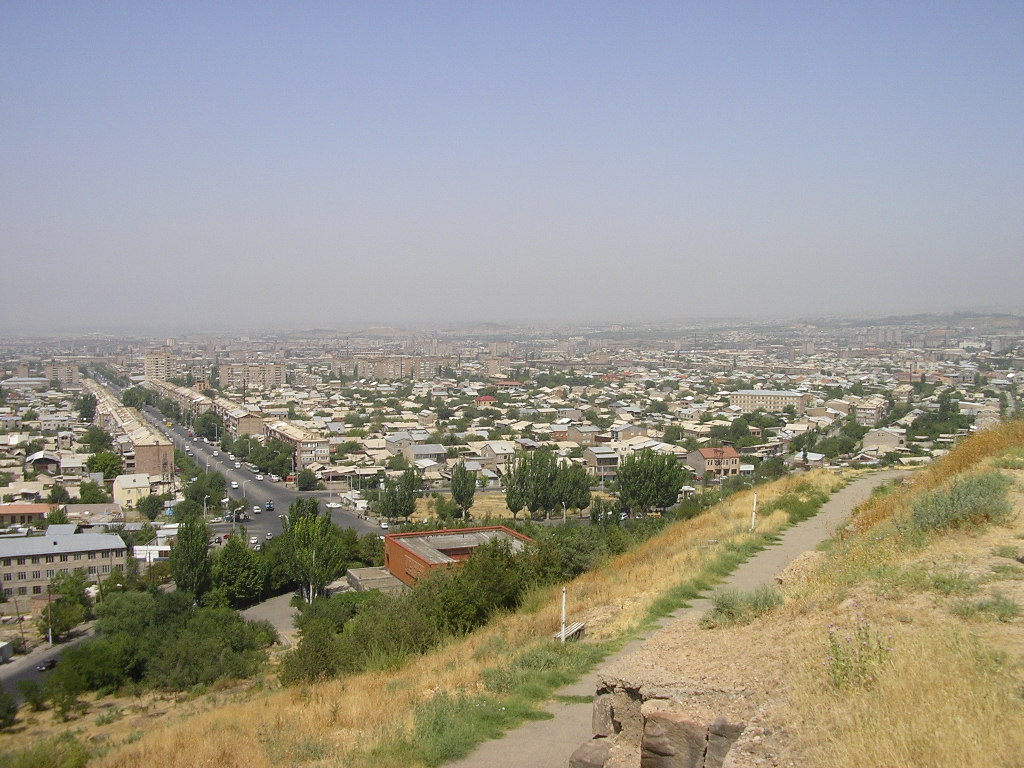 Erevan, vue générale